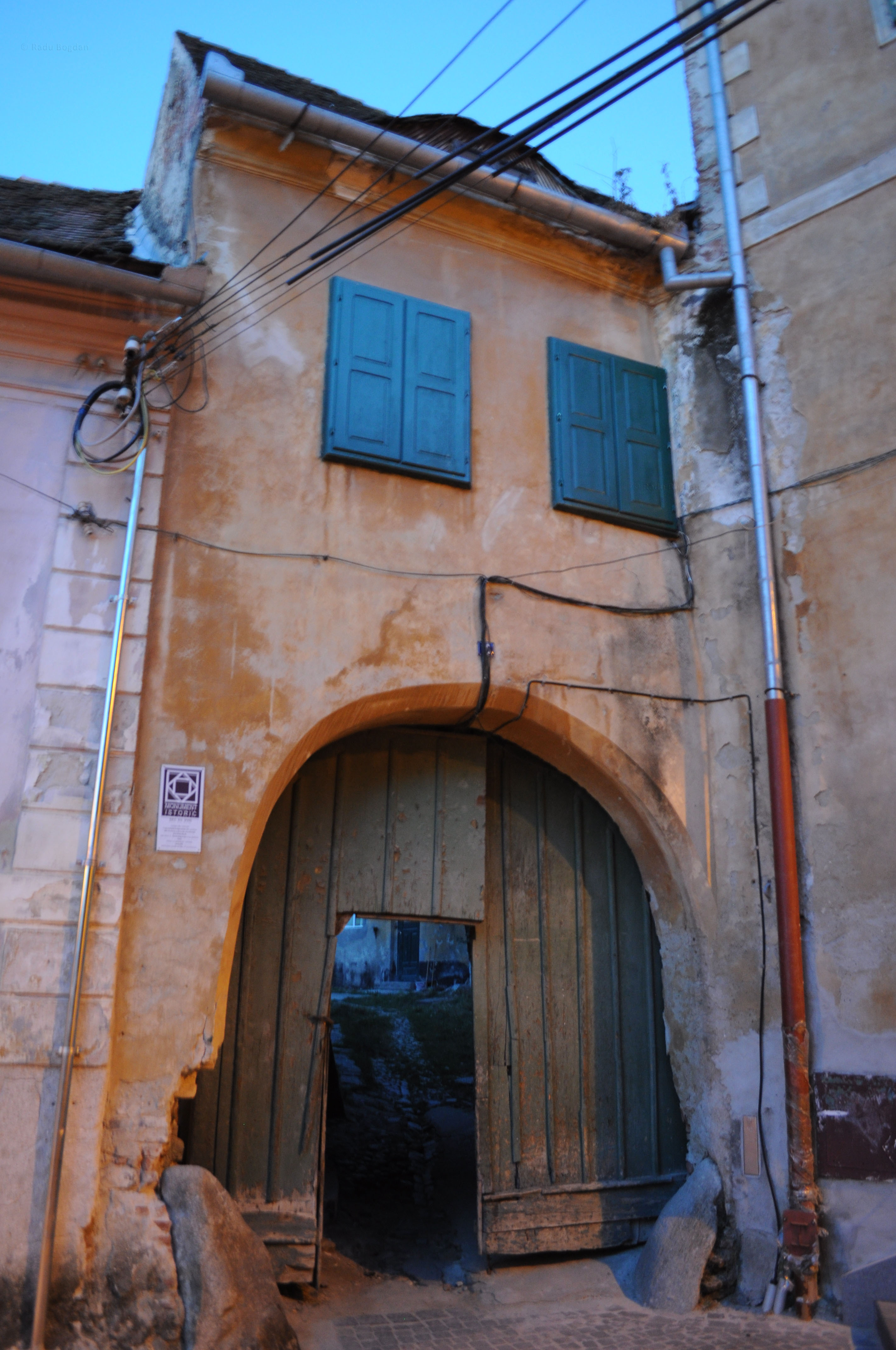 înglobează fragment curtină incinta III